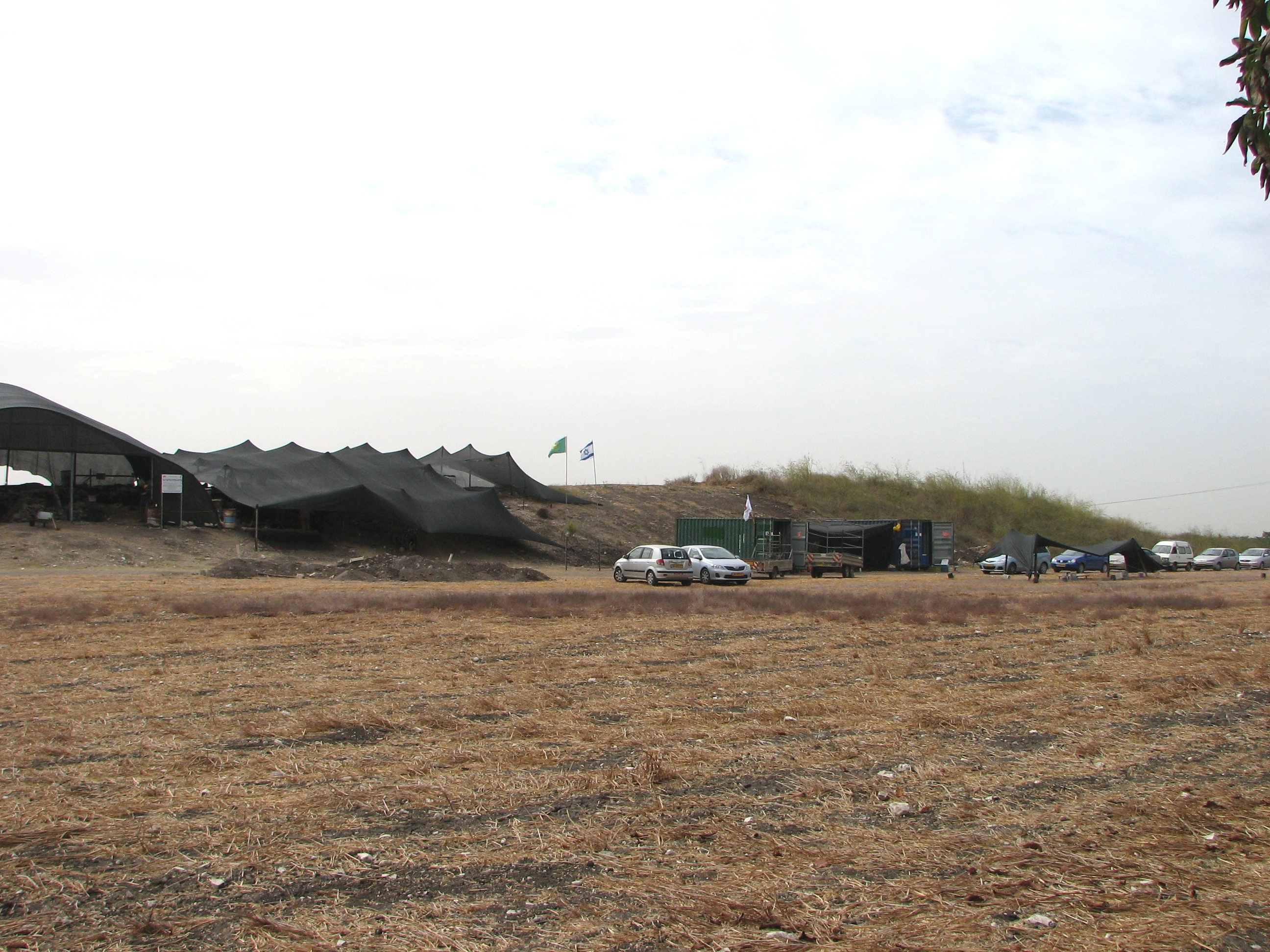 Tell Esur תל-אסור, שנמצא בפתחו המערבי של נחל עירון. התל נחפר על ידי הארכאלוג אדם זרטל בשנים 2001-2003 וכן על ידי שי בר מאוניברסיטת חיפה בשנת 2010 מראה כללי של התל מכוון מערב בעונת חפירות 2010